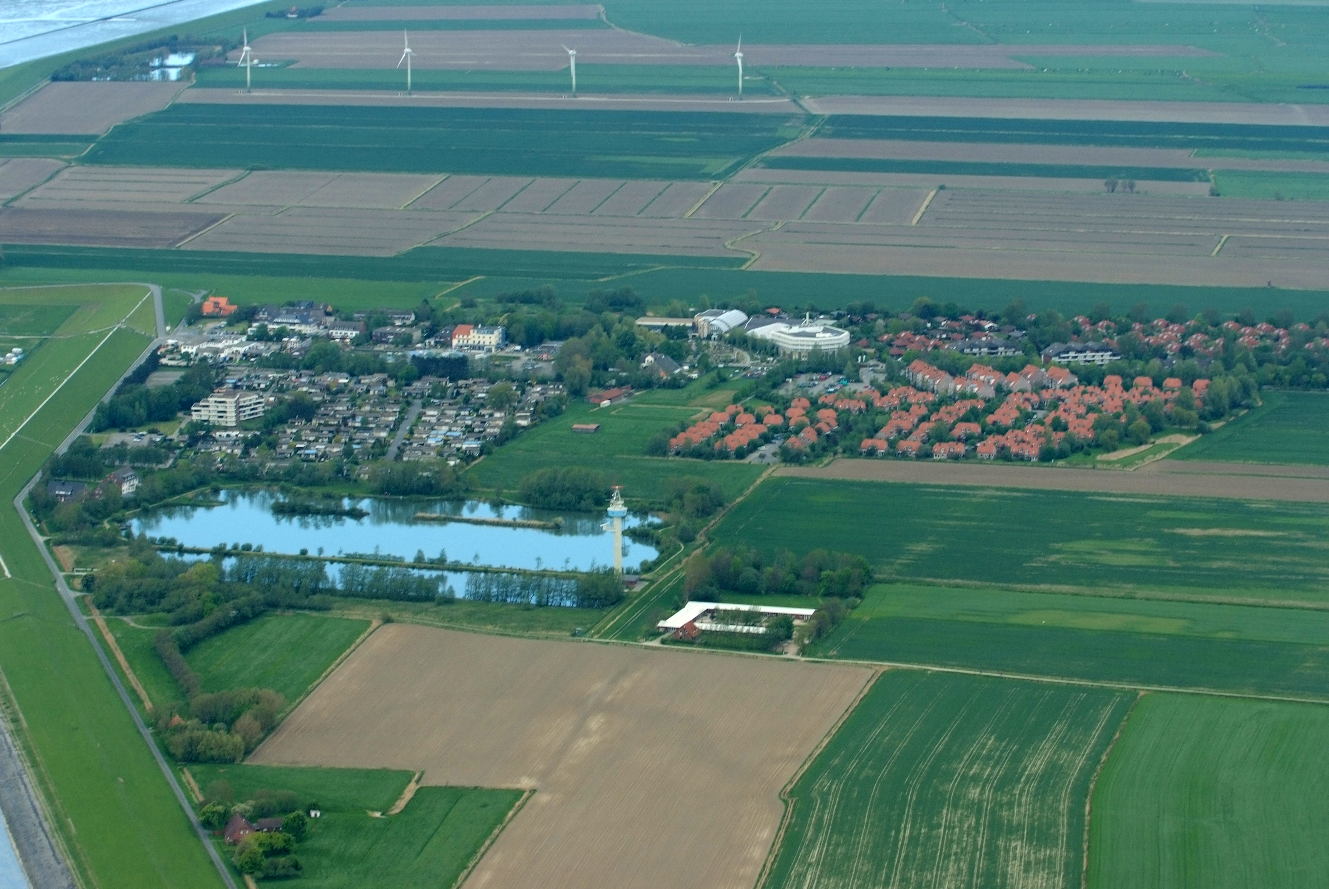 Tossens Fotoflug vom Flugplatz Nordholz-Spieka über Bremerhaven, Wilhelmshaven und die Ostfriesischen Inseln bis Borkum